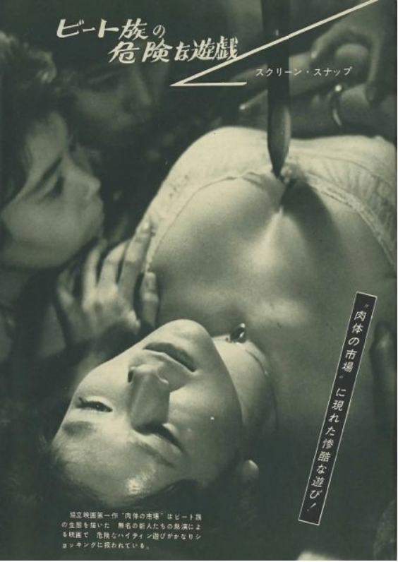 『肉体の市場』紹介記事